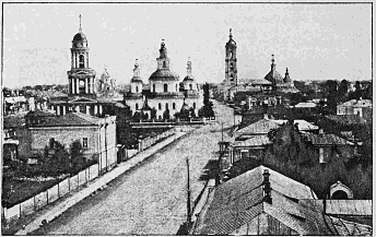 Вигляд міста Суми.